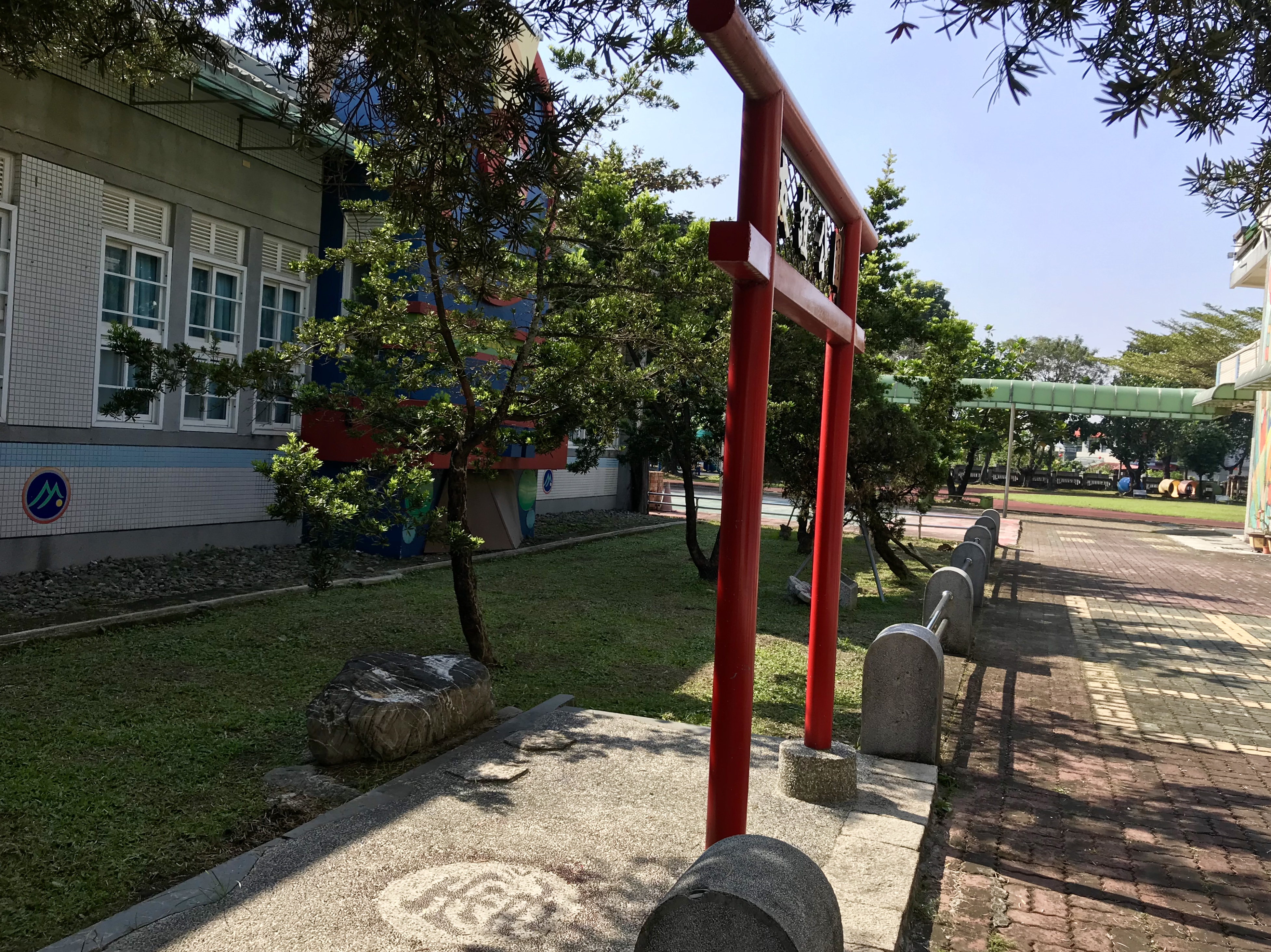 竹田國小友誼公園一景